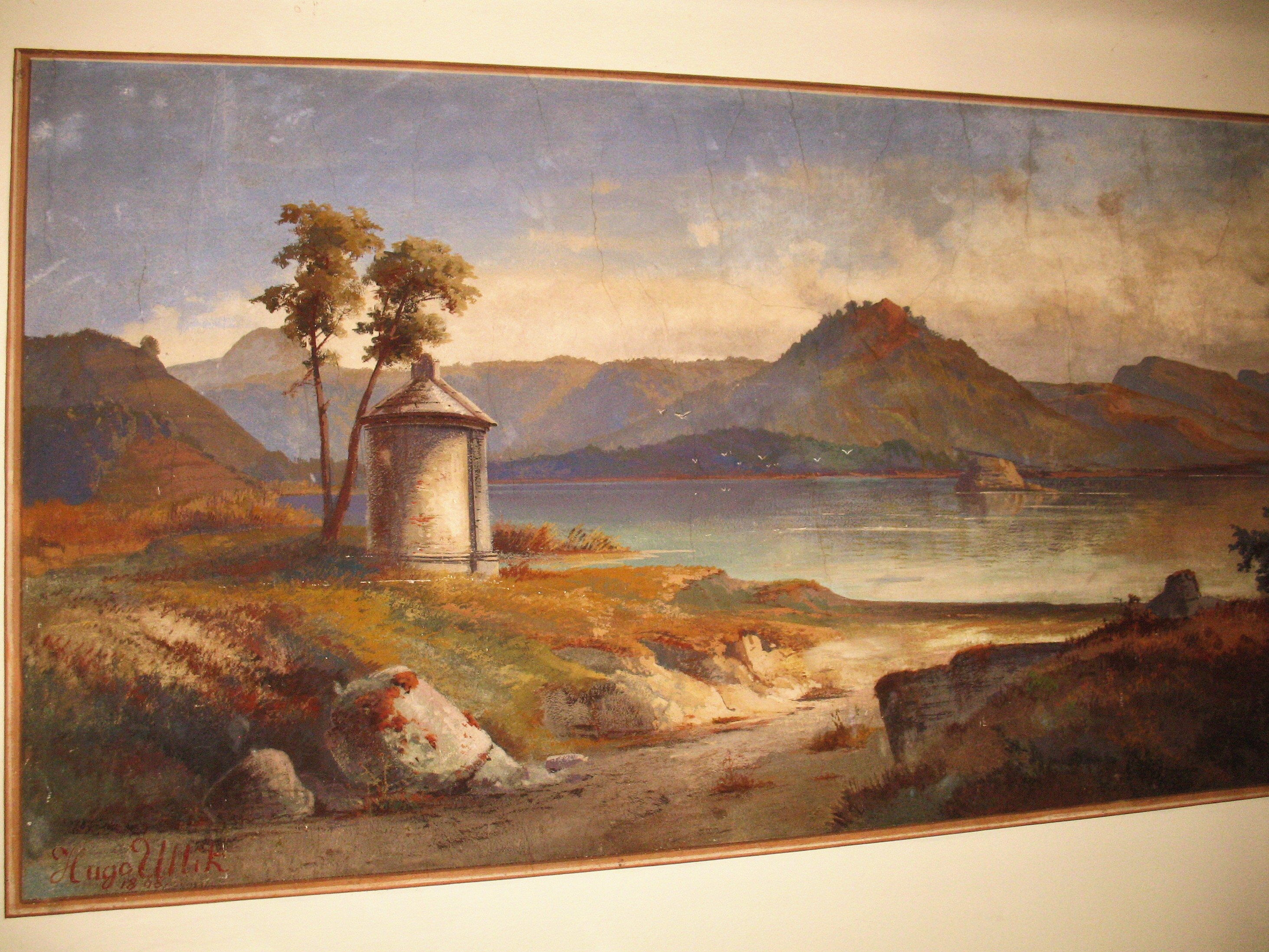 Velký rybník na obraze Hugo Ullika z roku 1869